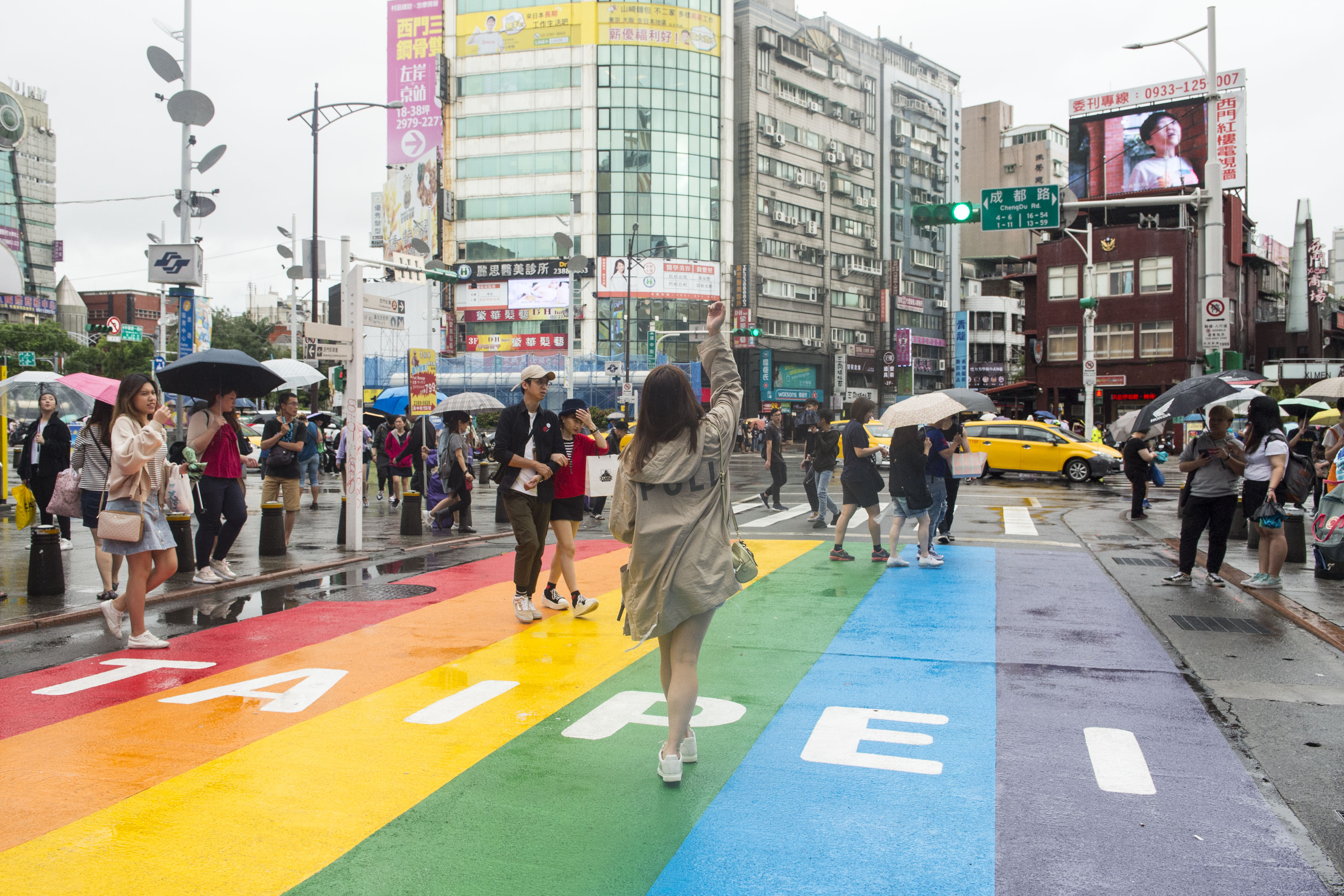 (Foto by Jan Hagelstein) Mit Democracy International und Mehr Demokratie besuchten wir das "Global Forum on Modern Direct Democracy 2019" in Taiwan. Dort veranstalteten wir zwei Workshops und sprachen auch über den erweiterten Kunstbegriff von Joseph Beuys sowie unsere Kreditinitiative. Hier ein Bild von der Demonstration für Demokratie. Hier geht's zum Blog